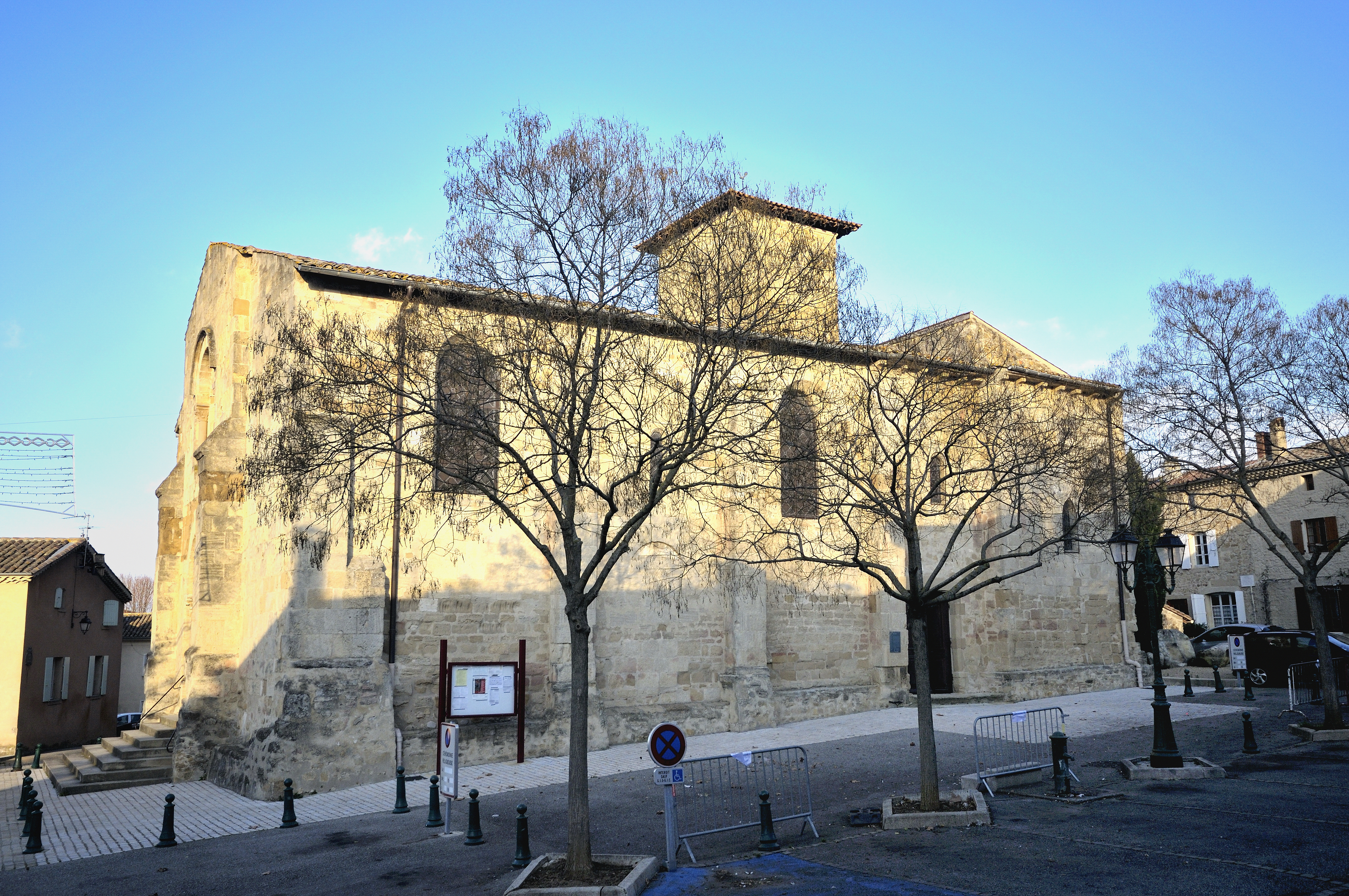 église de Beaumont les valence drôme